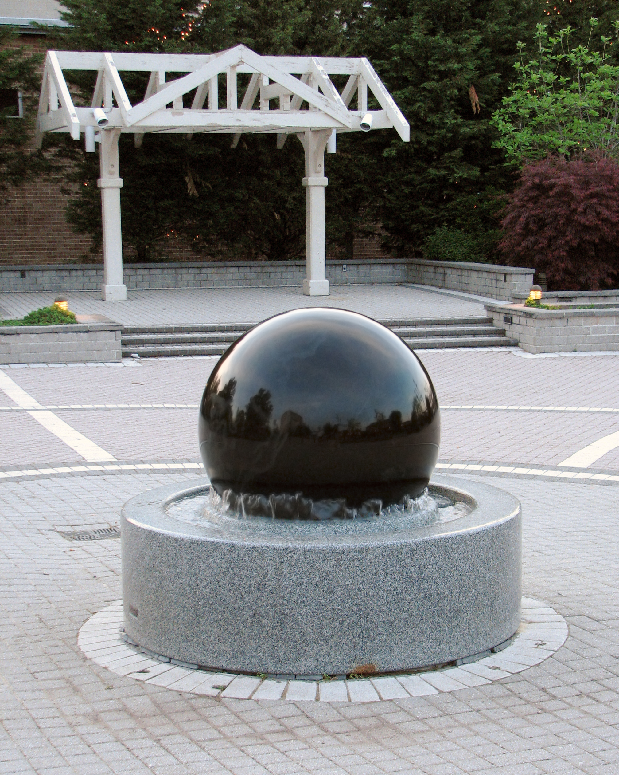 The Kugel Ball in Lansdale, Pennsylvania